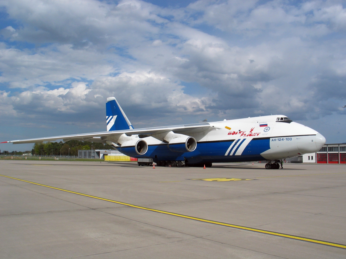 Antonov A124 auf dem Vorfeld 2 des Flughafens Karlsruhe/Baden-Baden